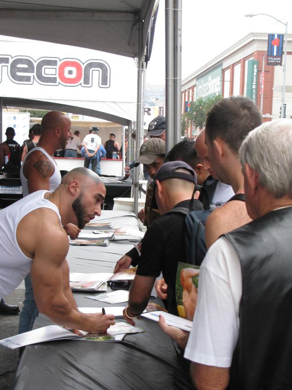 François Sagat em feira de autográfos da Titan Man.